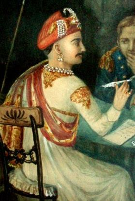 Baji Rao II